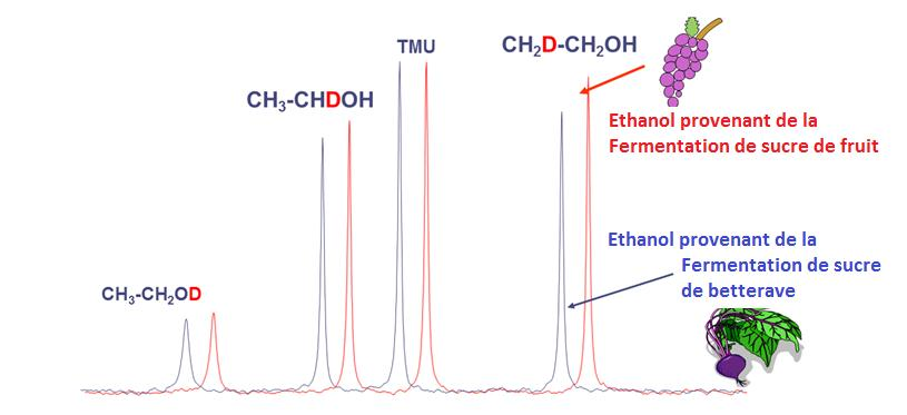 Spectre RMN-2H de l'éthanol